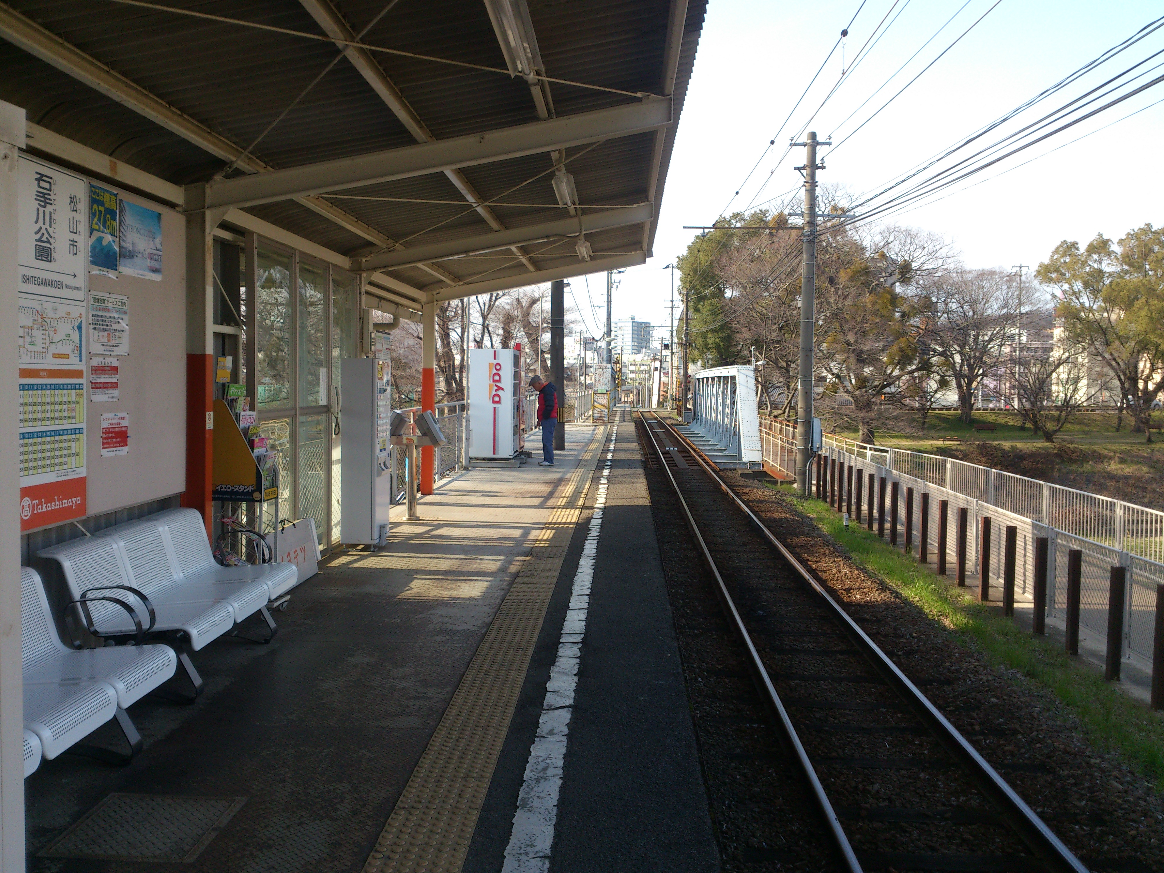 石手川公園駅のホーム